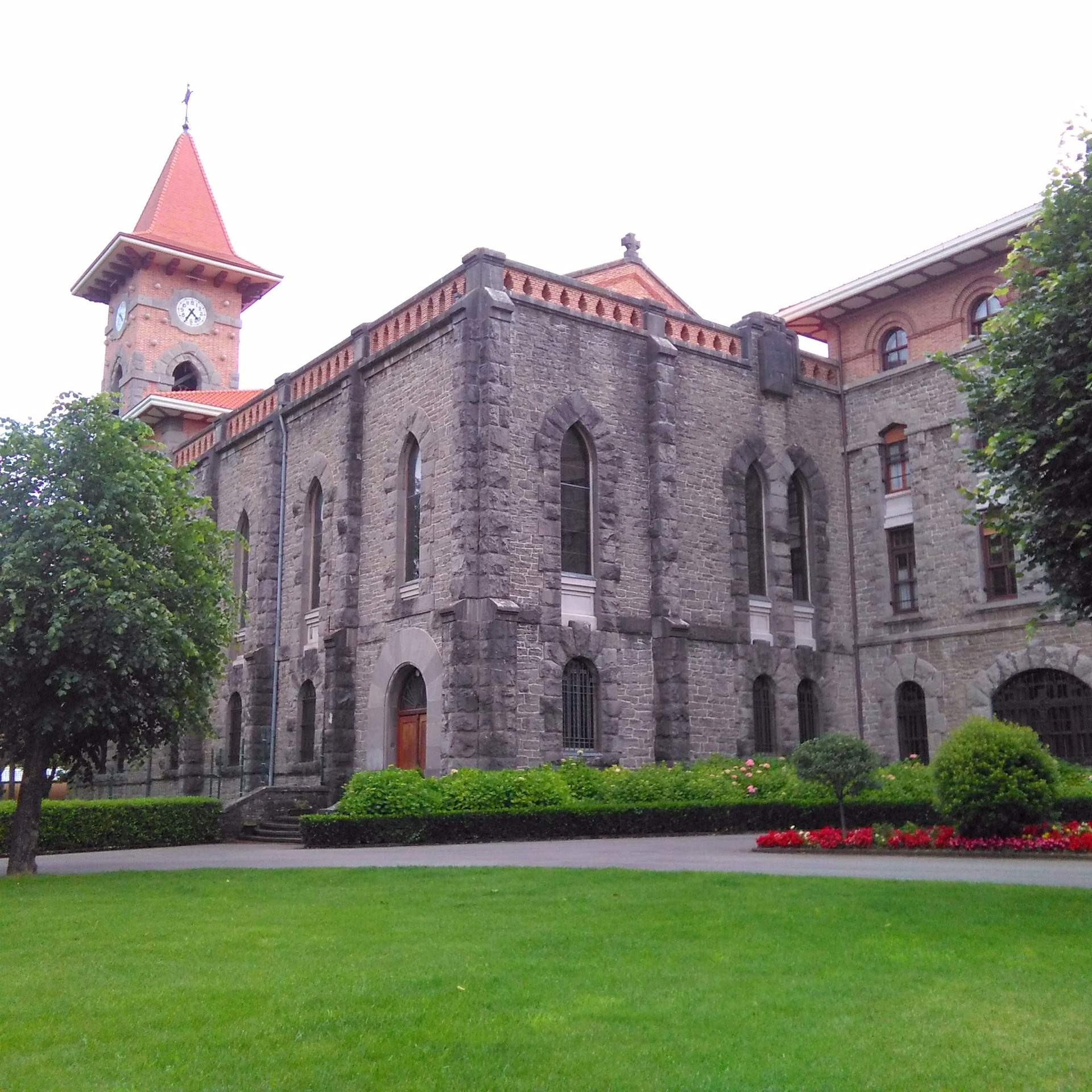 Facultad de Teología del Norte de España-Sede Vitoria (Seminario)